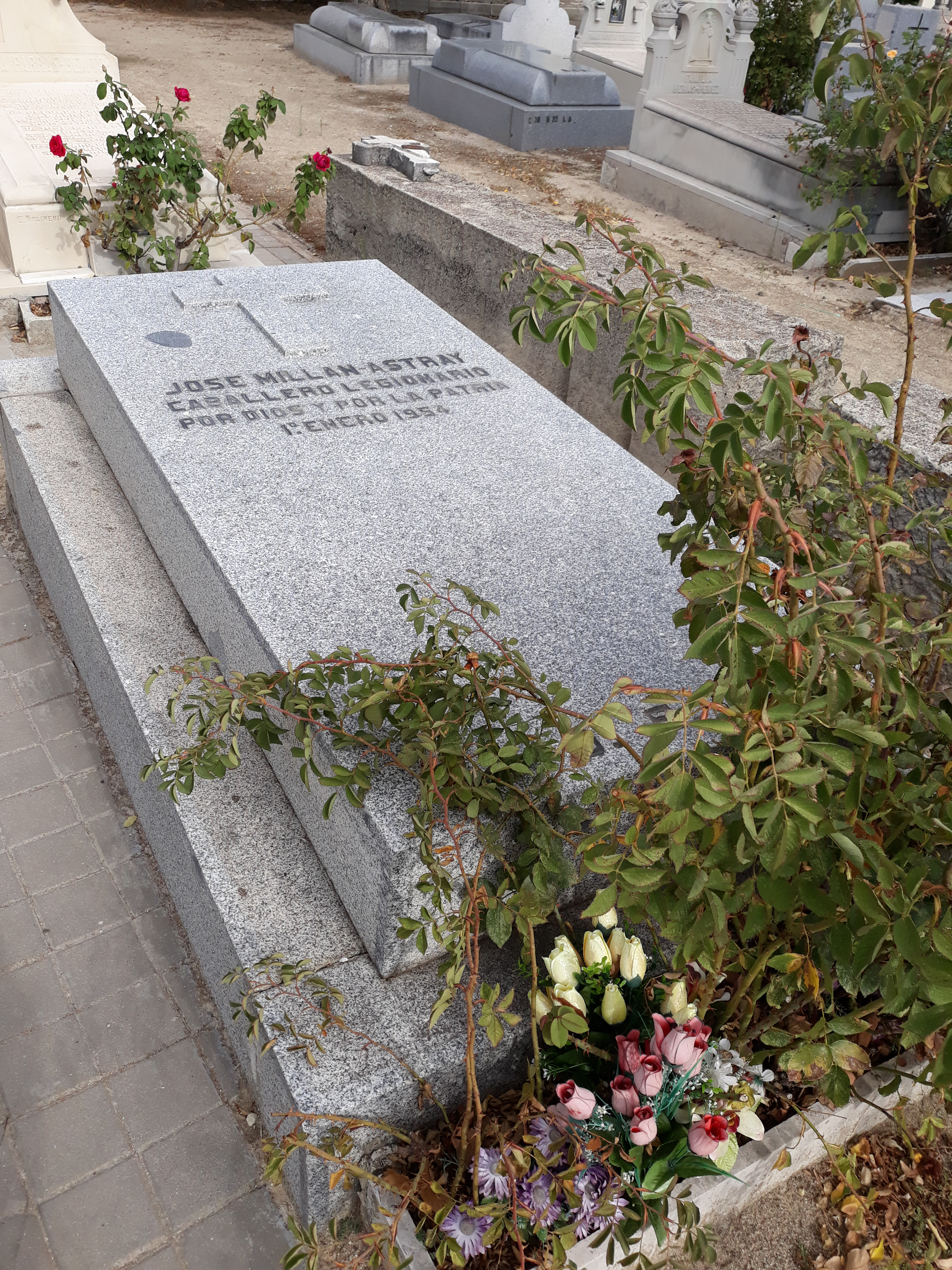 Das Grab des spanischen Offiziers José Millan Astray auf dem Almudena-Friedhof in Madrid (Spanien)